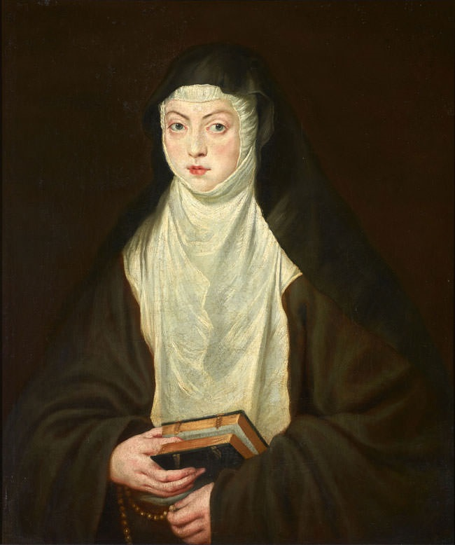 Retrato de sor Ana Dorotea de Austria (1612-1694), que fue hija ilegítima del emperador Rodolfo II de Habsburgo y monja en el monasterio de las Descalzas Reales de Madrid, ciudad en la que falleció en 1694.